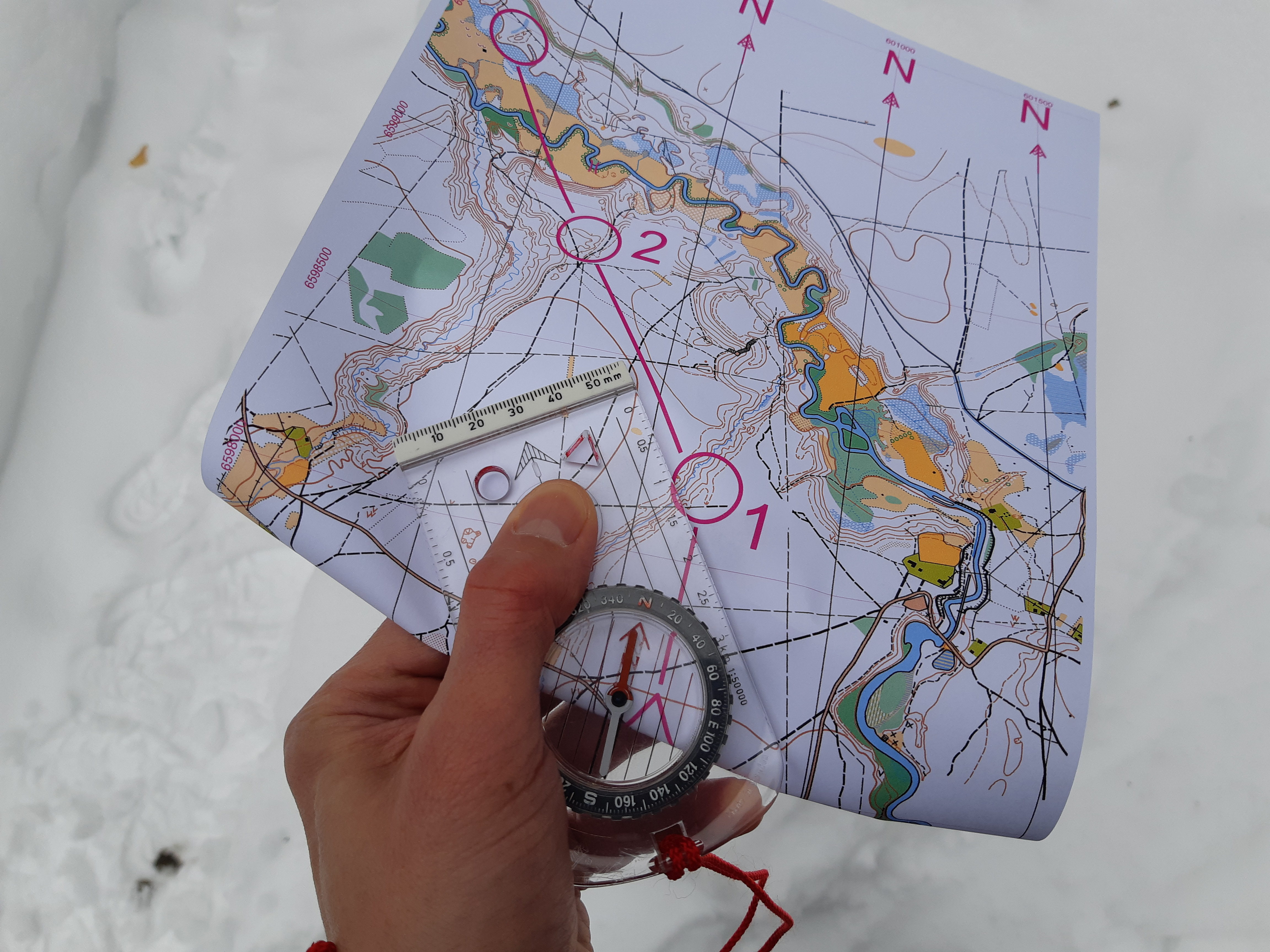 Plaadikompass ja orienteeritud kaart